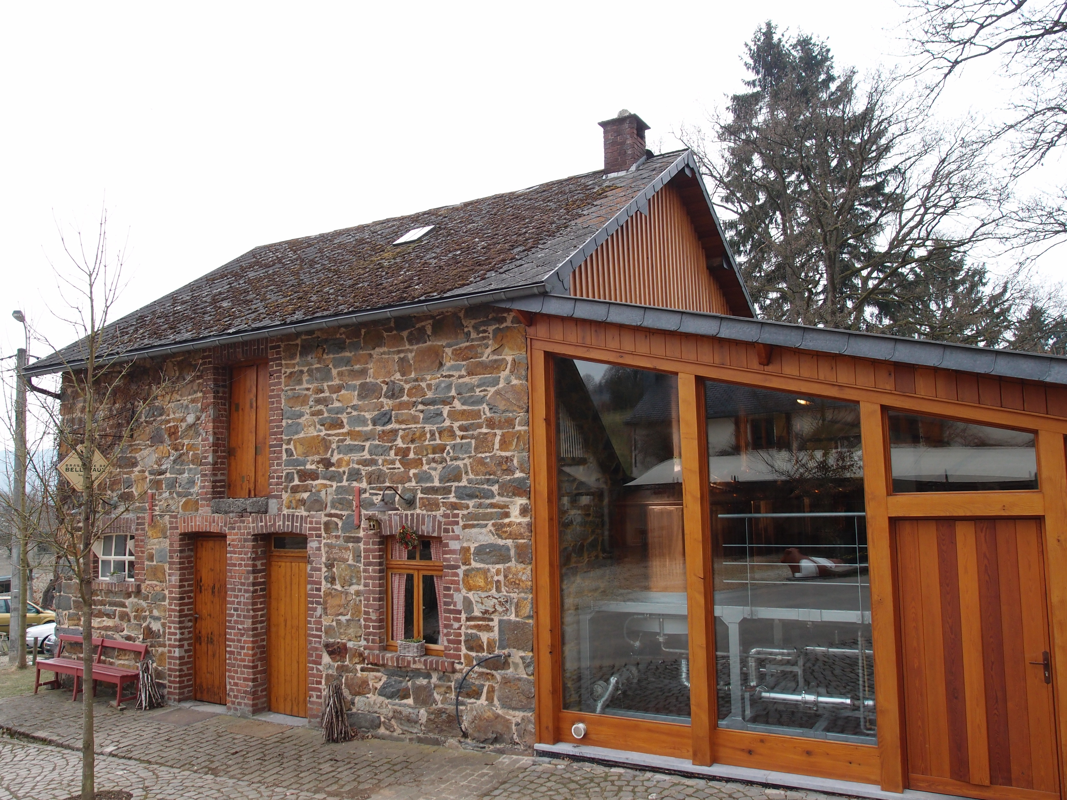 Brauerei Belleveaux / Brasserie De Belleveaux (Bellevaux/Malmedy/Belgien) Datum: 30.03.2013 Urheber: M. Pfeiffer alias Gordito1869 Quelle: Privates Fotoarchiv des Urheber